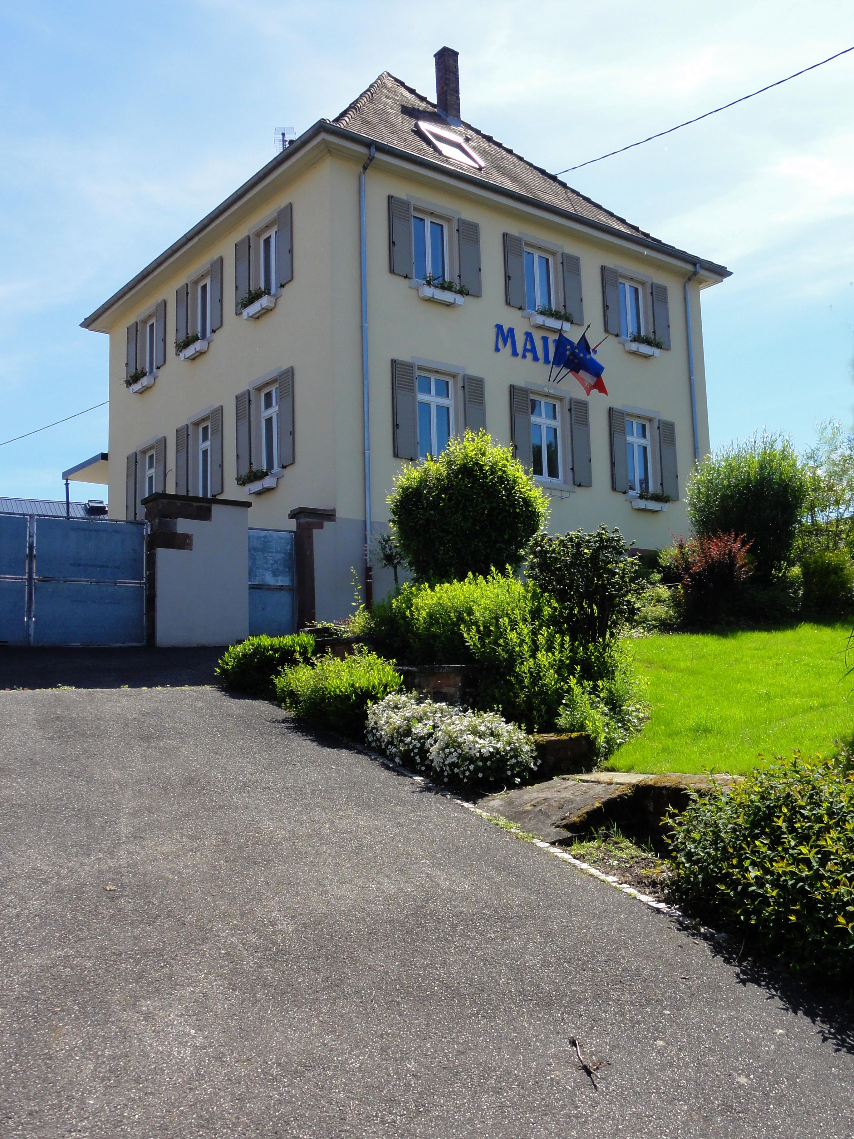 Alsace, Bas-Rhin, Bitschoffen, Mairie (XX).